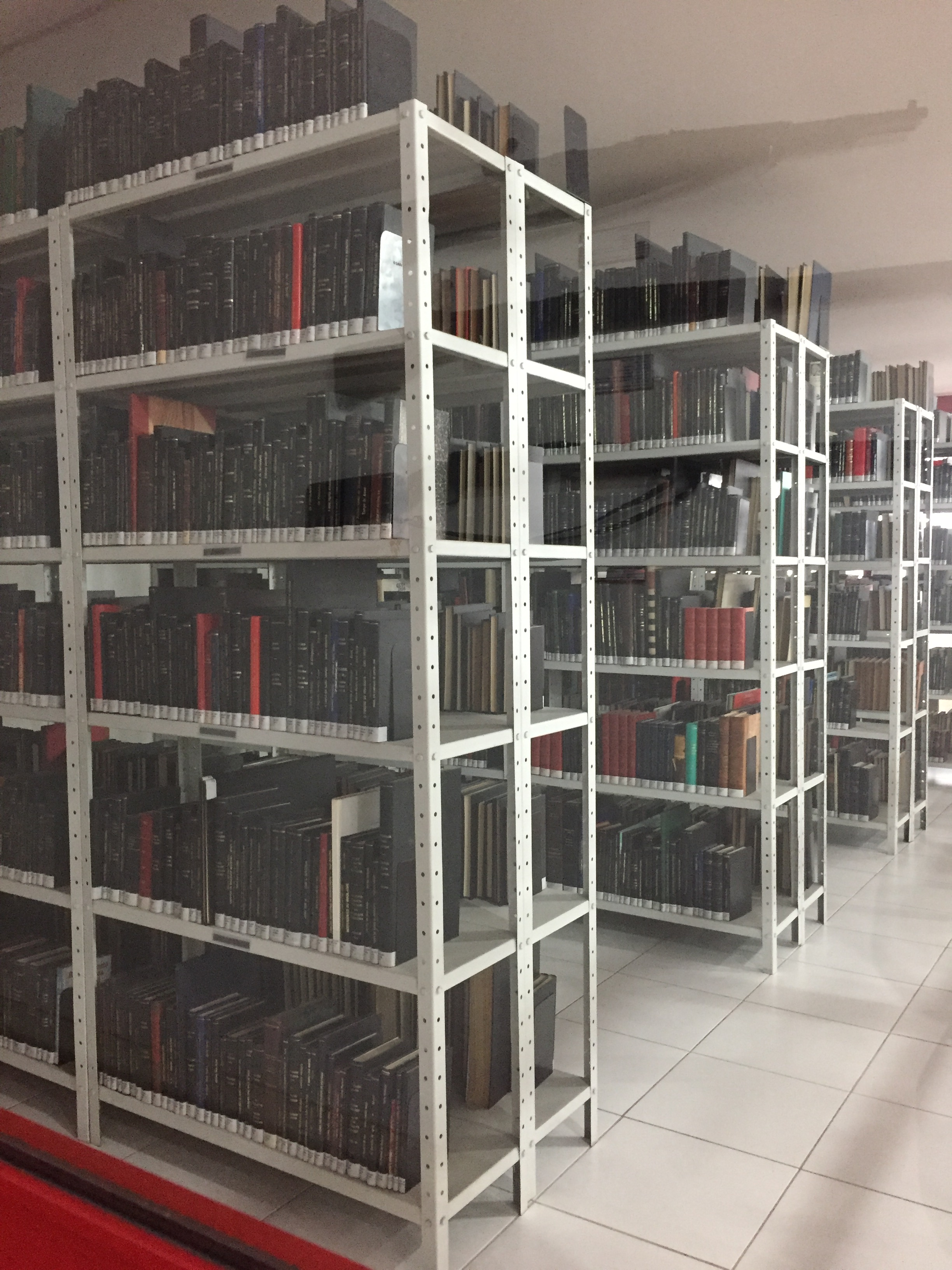 Acervo de livros decorrentes da Revolução de 32.